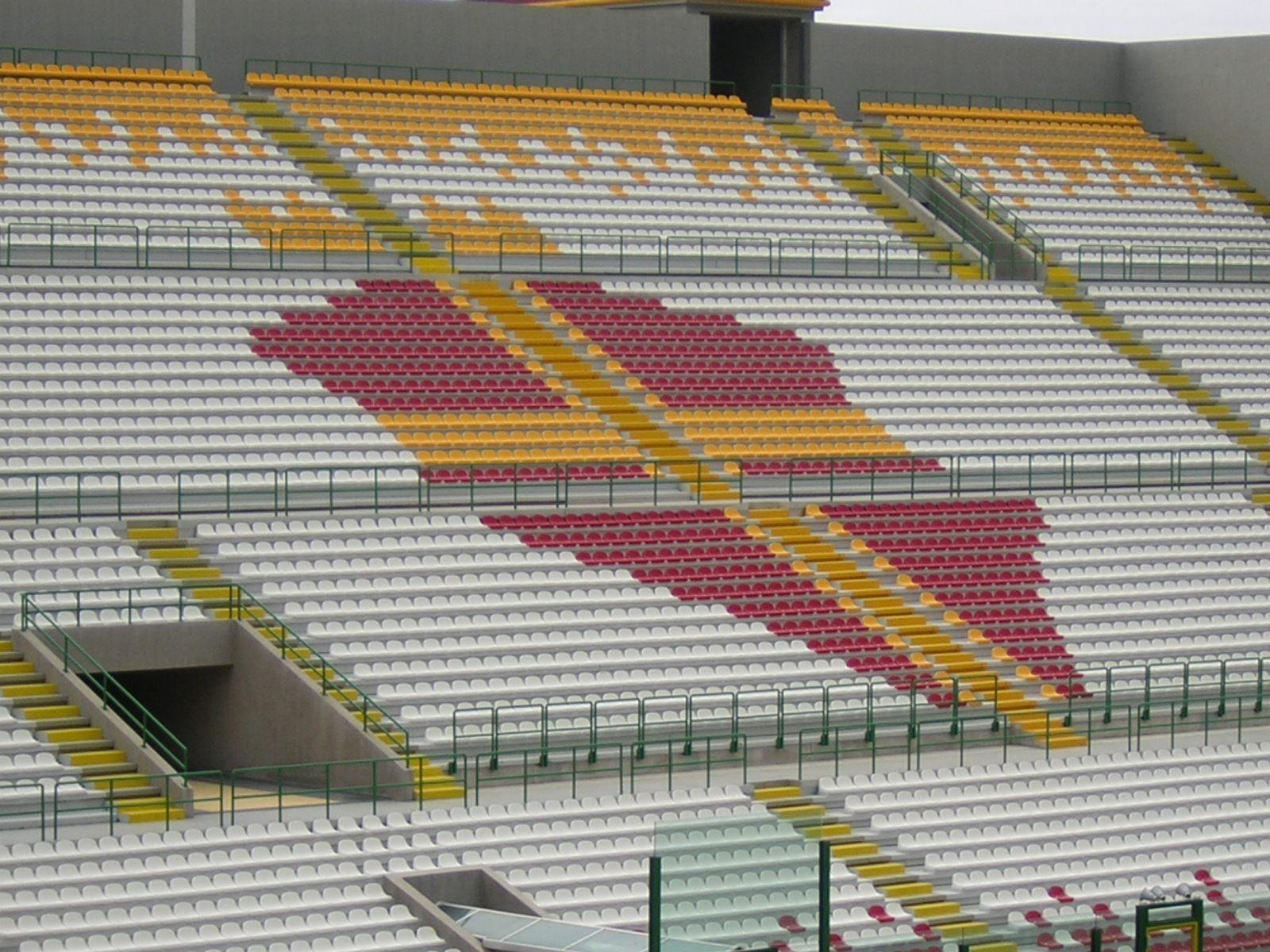 Dettaglio curva Sud stadio San Filippo Messina. Foto personale. Messina 2004